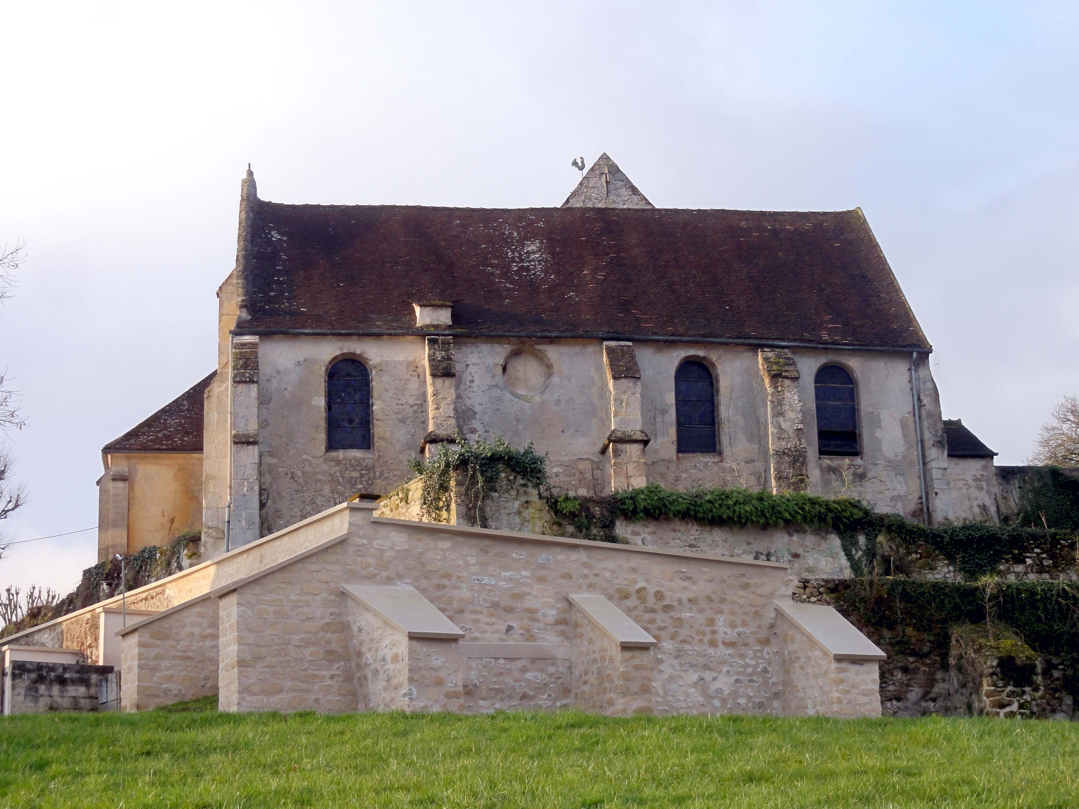 Vue depuis le nord.